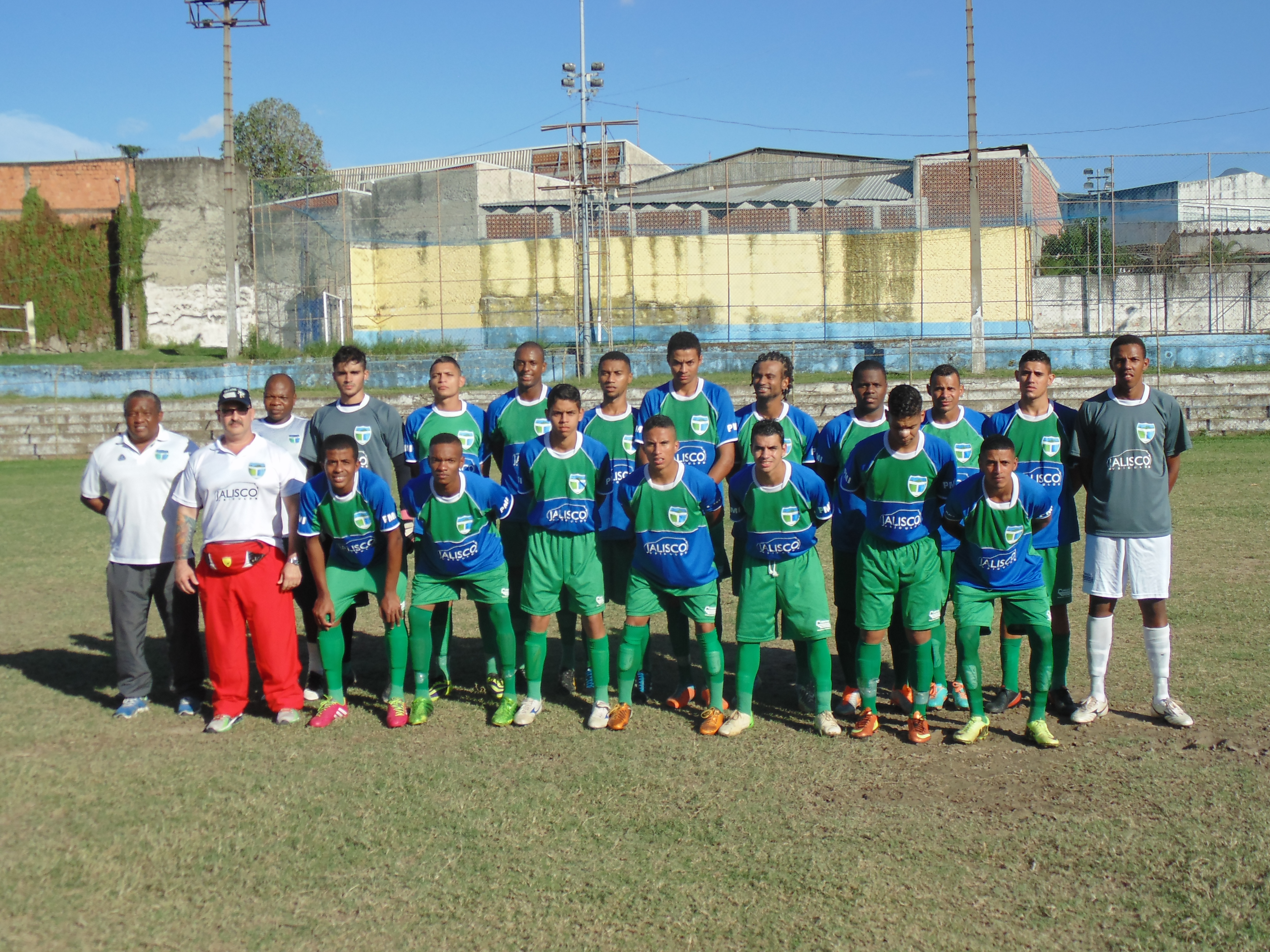 Equipe profissional do Itatiaia em 2014 que disputa a Série C do Rio de Janeiro.